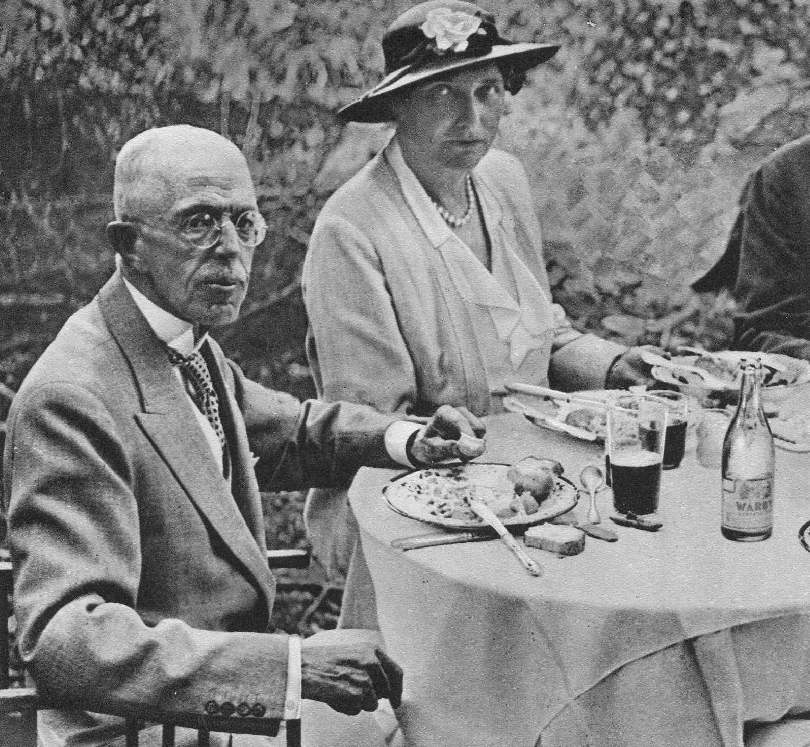 Gustaf V på Särö med Wårbyvatten på bordet